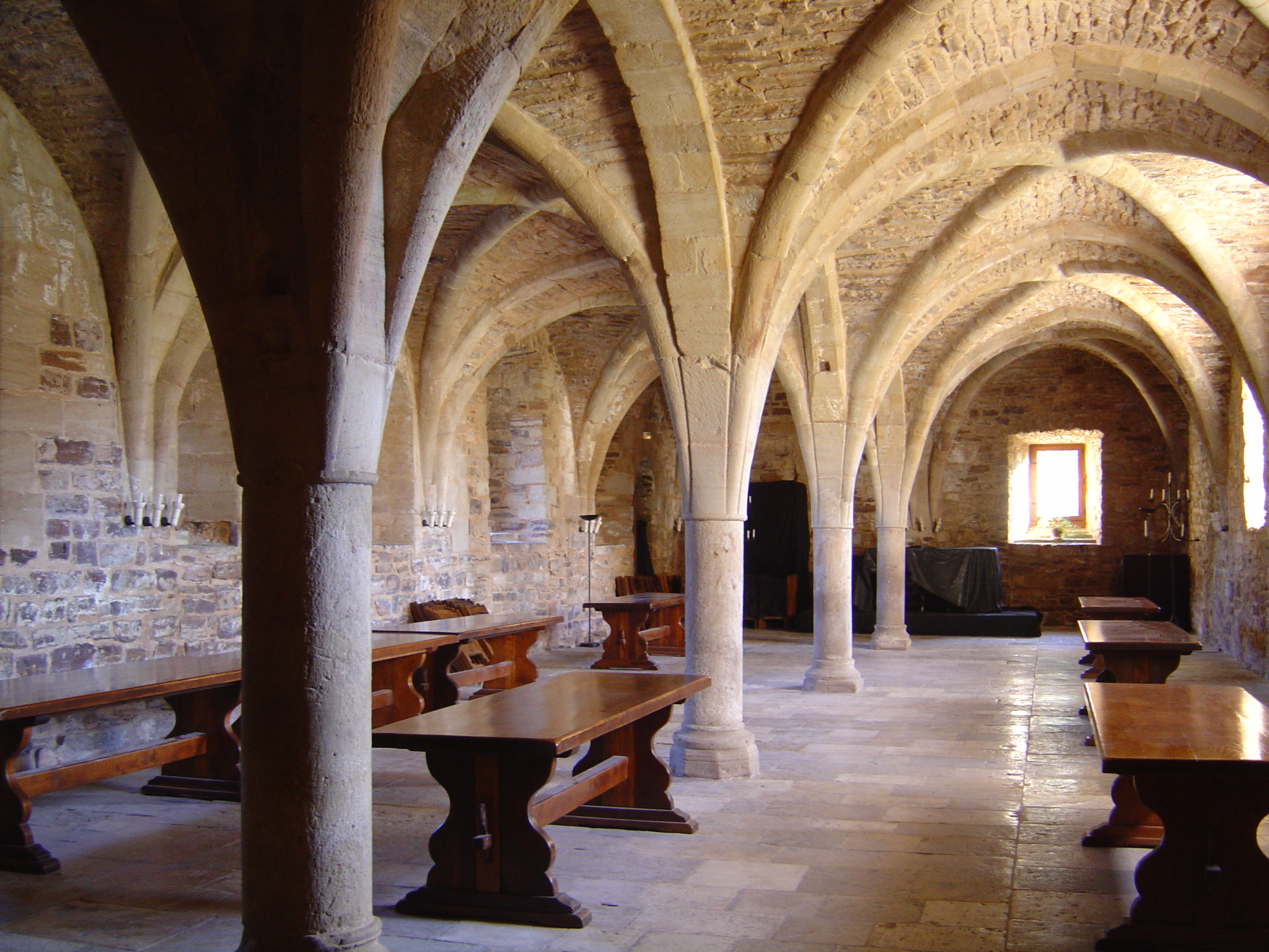 Le scriptorium de l'Abbaye de Sylvanès comporte des voûtes en croisée d'ogives érigées au XIIIème siècle.